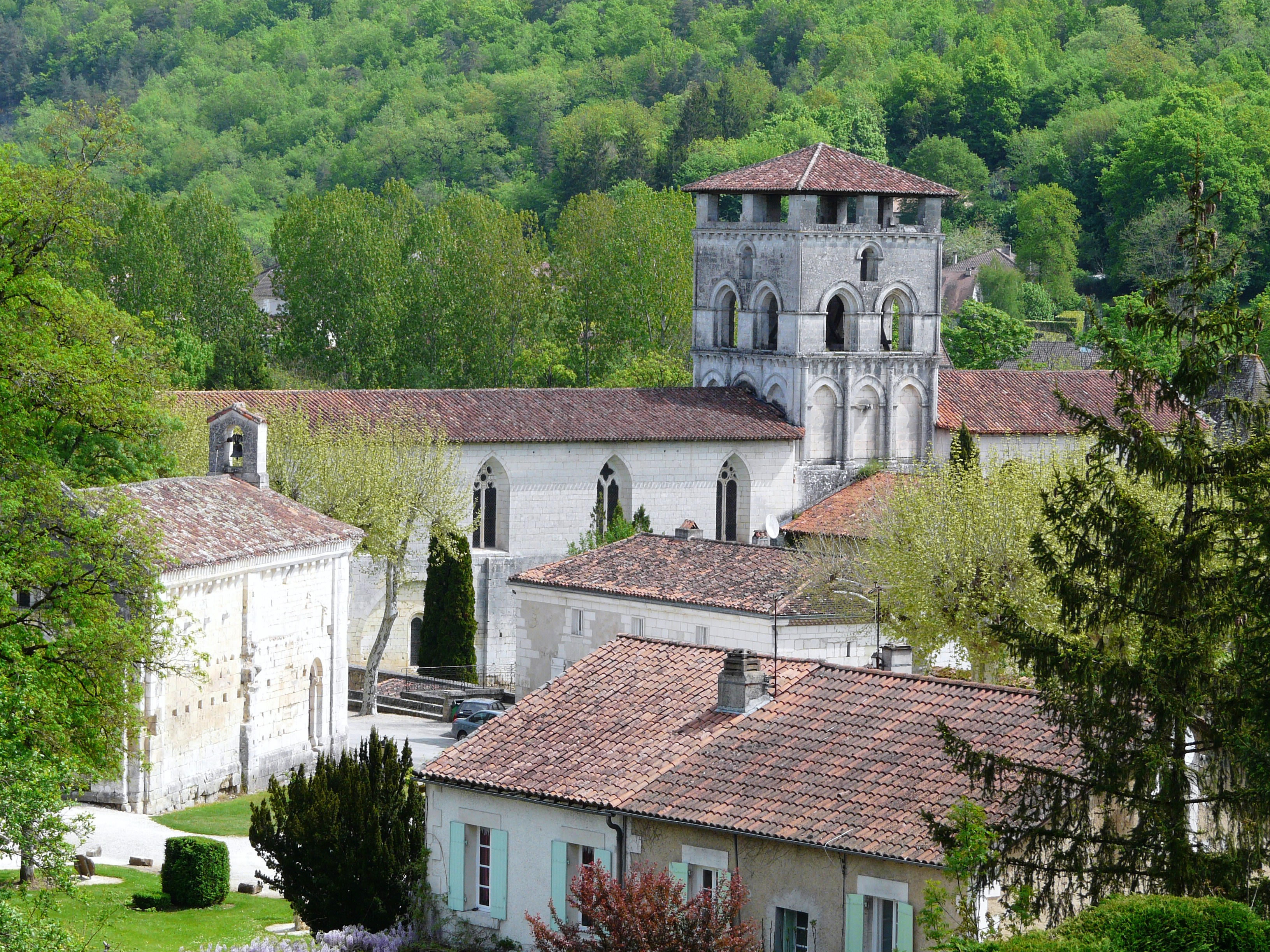 Le site de l'abbaye de Chancelade (chapelle + église)